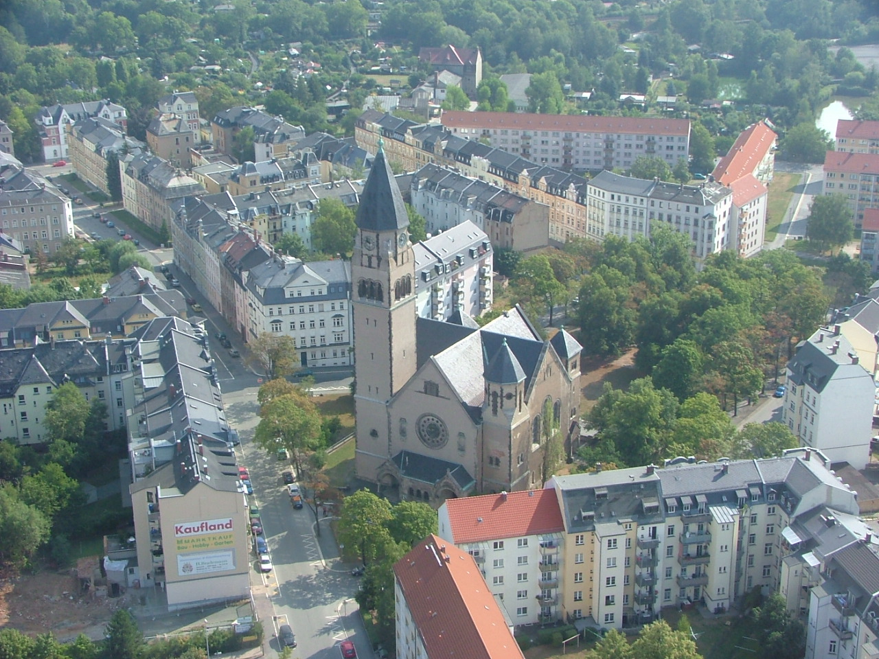 Bei einem Hubschrauberflug im August 2005 aus nordwestlicher Richtung aufgenommen.